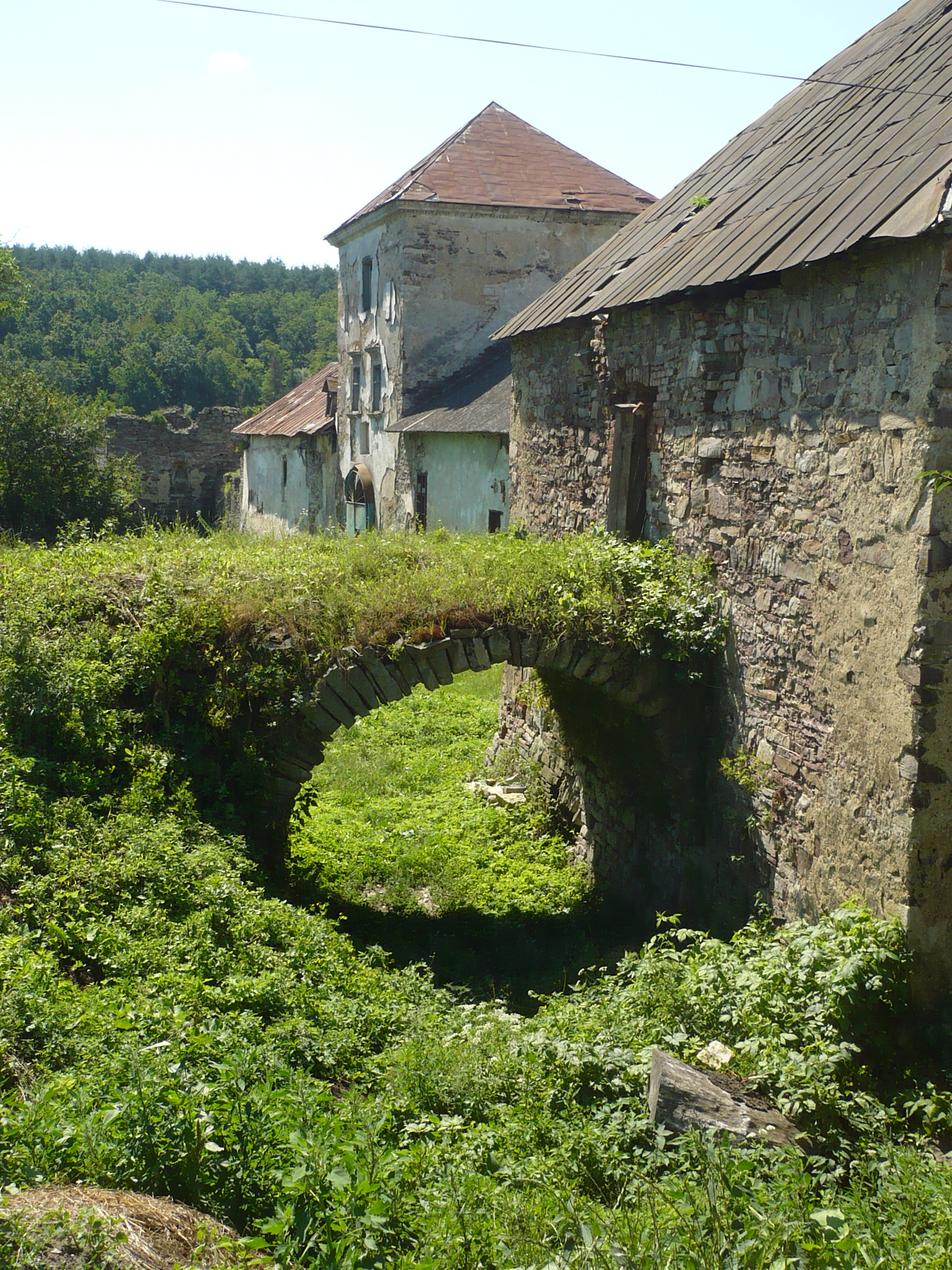 Potok Złoty. Zamek